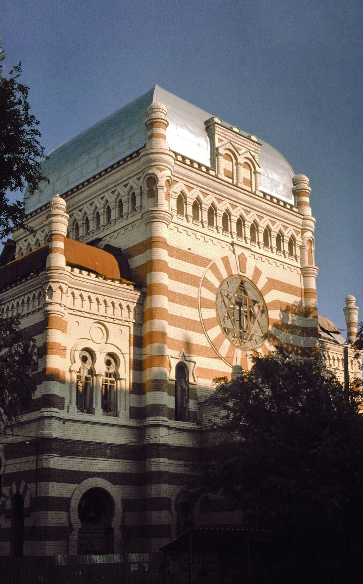 Самарская хоральная синагога на ул. Садовой